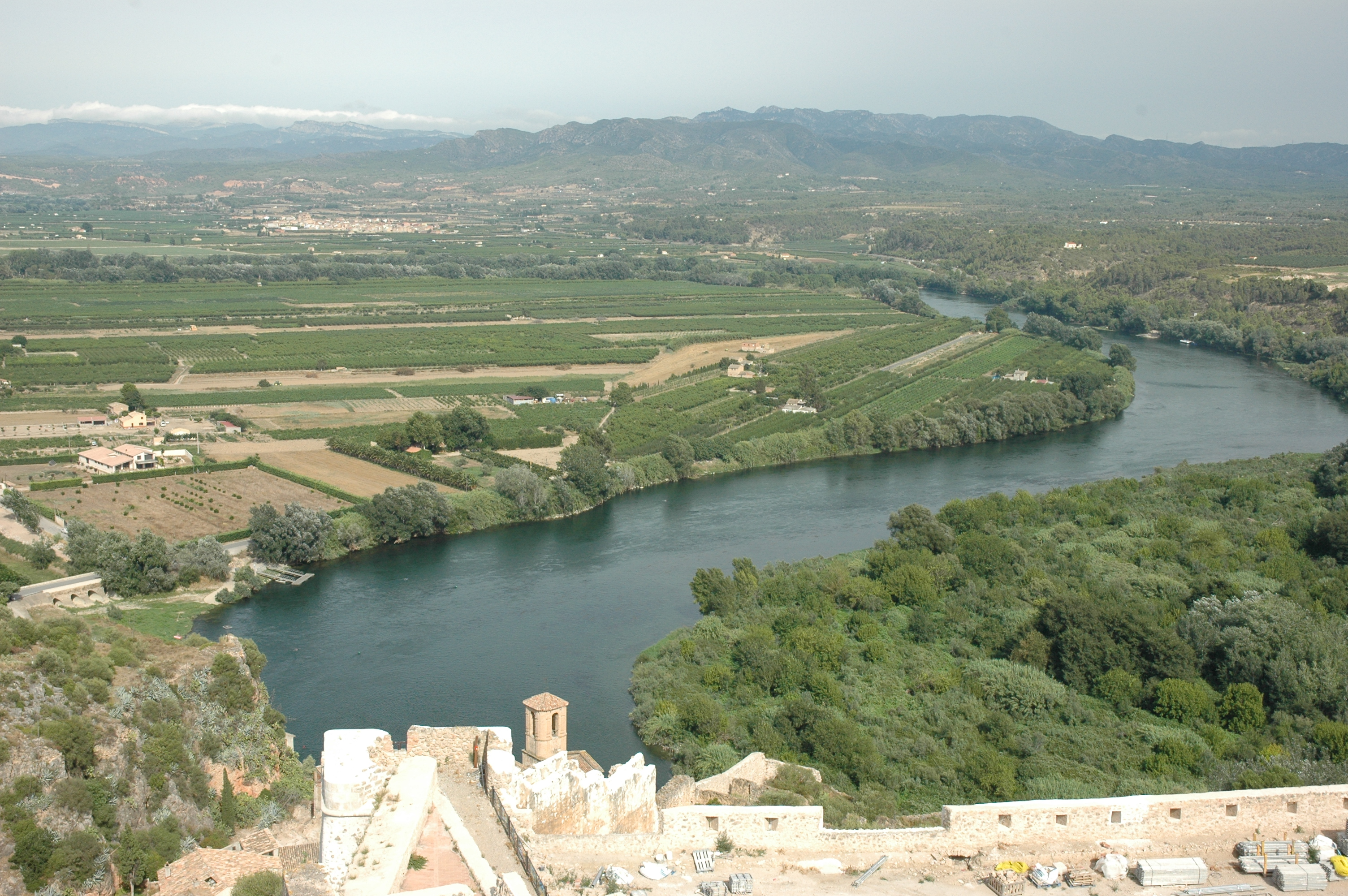 Castell de Miravet - Riu Ebre